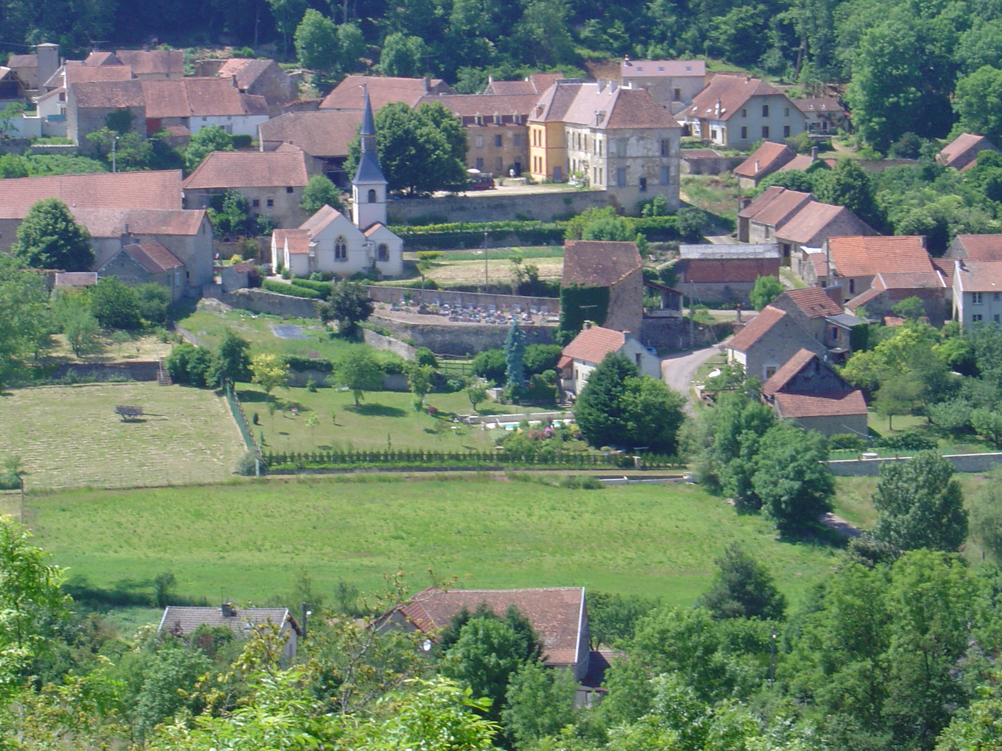 Bourgogne, Les grangeots, Sainte-Colombe, Côte-d'Or